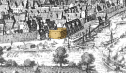 Ansicht von Münden durch Merian, Bildausschnitt, Bollwerk nachträglich eingefärbt, links die Wanfrieder Schlagd, rechts die Bremer Schlagd, in der Fortsetzung dahinter ab der Brücke die Kasseler Schlagd